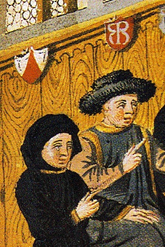 Titelbild aus Hektor Mülichs Abschrift der Stadtchronik Sigismund Meisterlins. Staats- und Stadtbibliothek Augsburg Codex Halder 1, Bl. 4v Ausschnitt zweier Ratsherren, Langenmantel vom Sparren links, Langenmantel vom doppelten R. rechts.